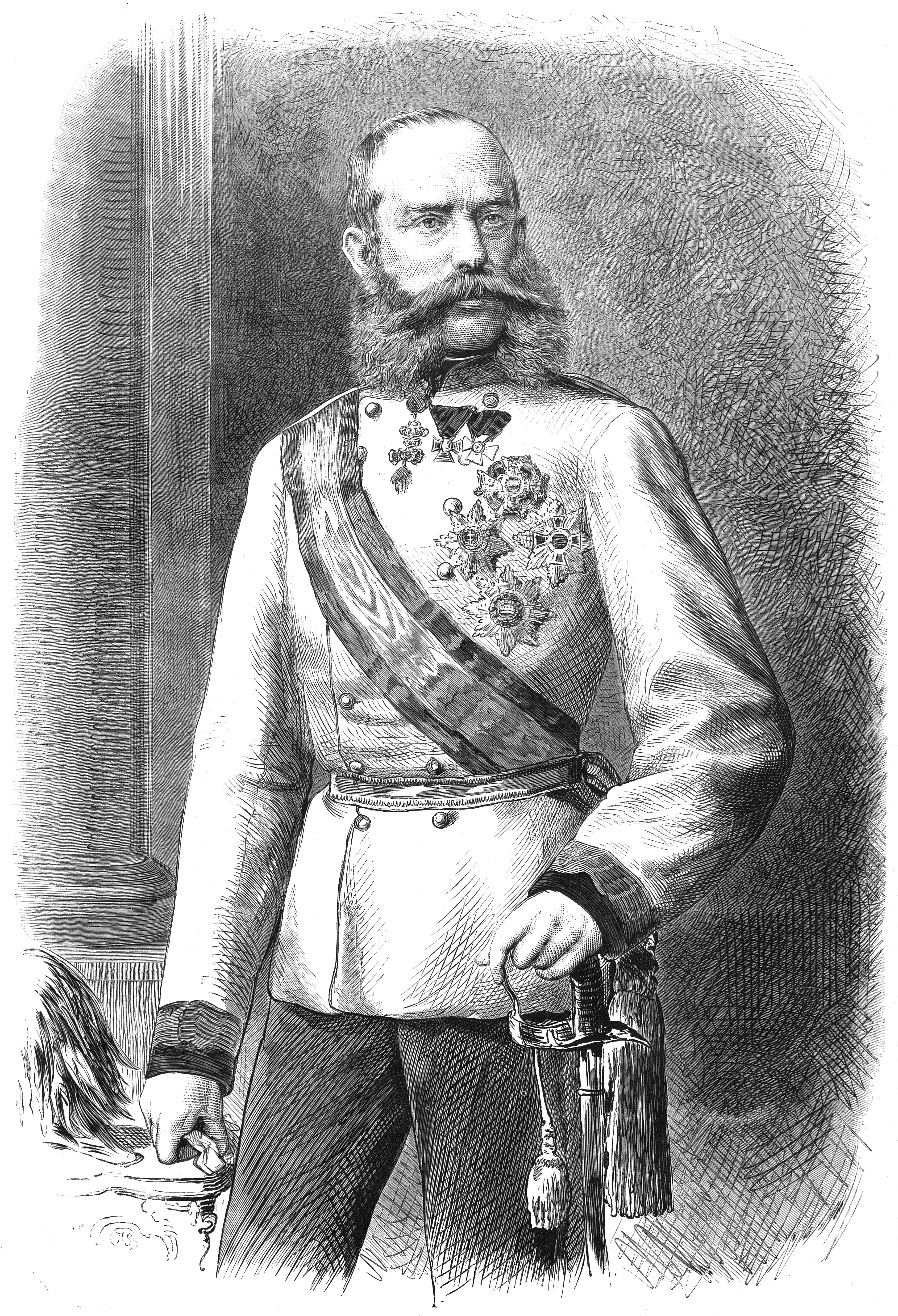 S.M. l’empereur François-Joseph Ier d’Autriche-Hongrie.